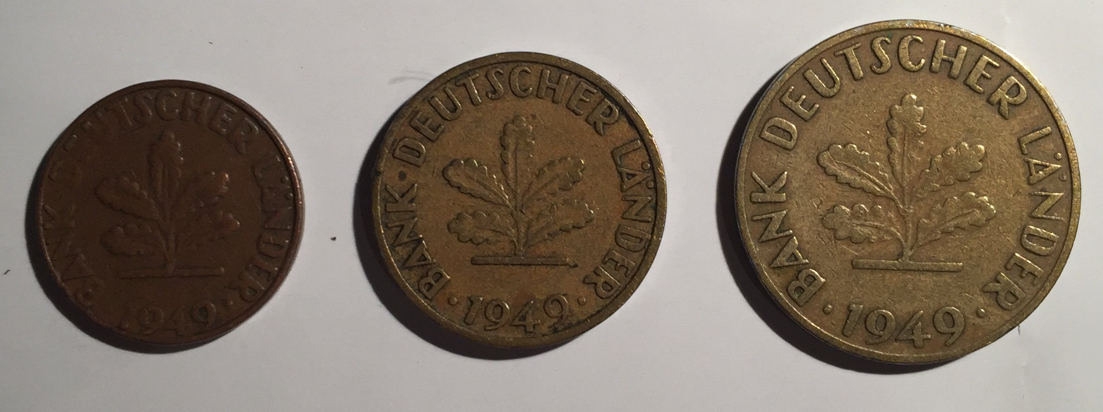 Münzen 1949 Bank deutscher Länder